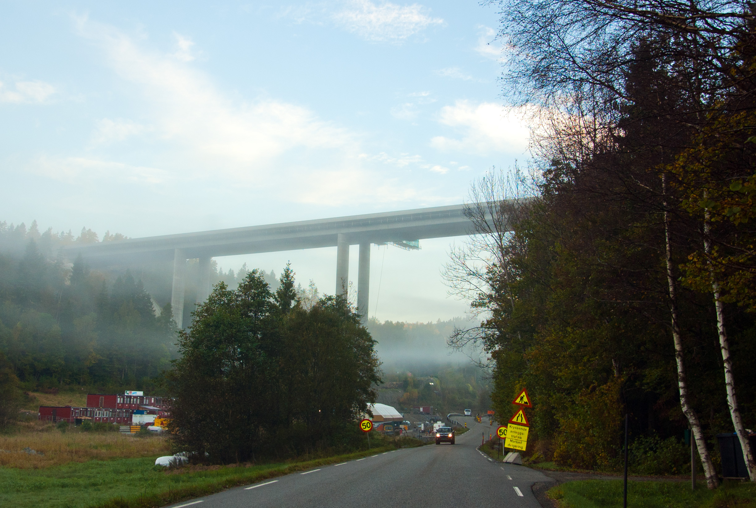 Kjosebrua på ny E18 i Vestfold